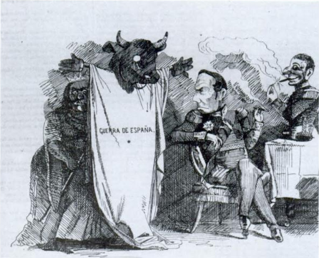 Caricatura en "El Charivari" (de Chile?) que ridiculiza la guerra con Espana. Pezet, Isabel II de Espana. Ver la similitud con Mumbo Jumbo. Political cartoon about the Pope threatening Victor Emmanuel with Excommunication, April 1860